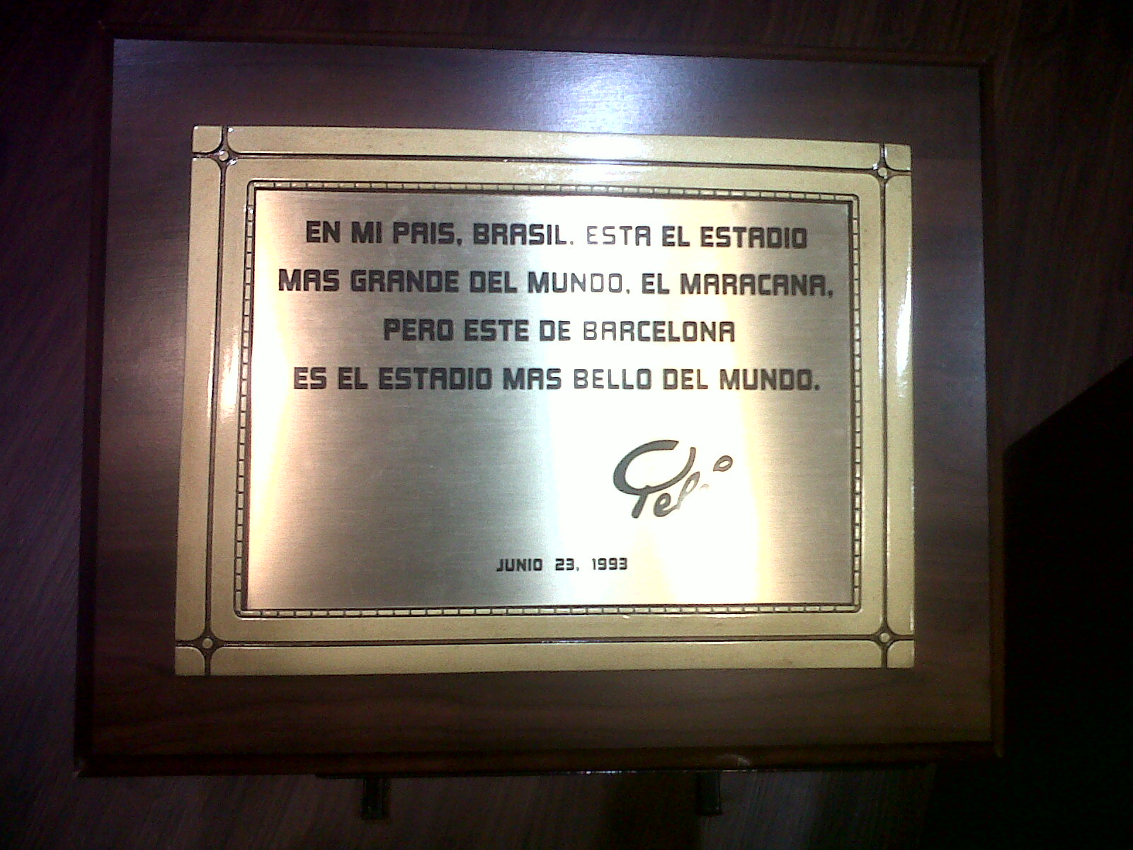 Barcelona Sporting Club - Pelé sobre el estadio Monumental de Barcelona SC